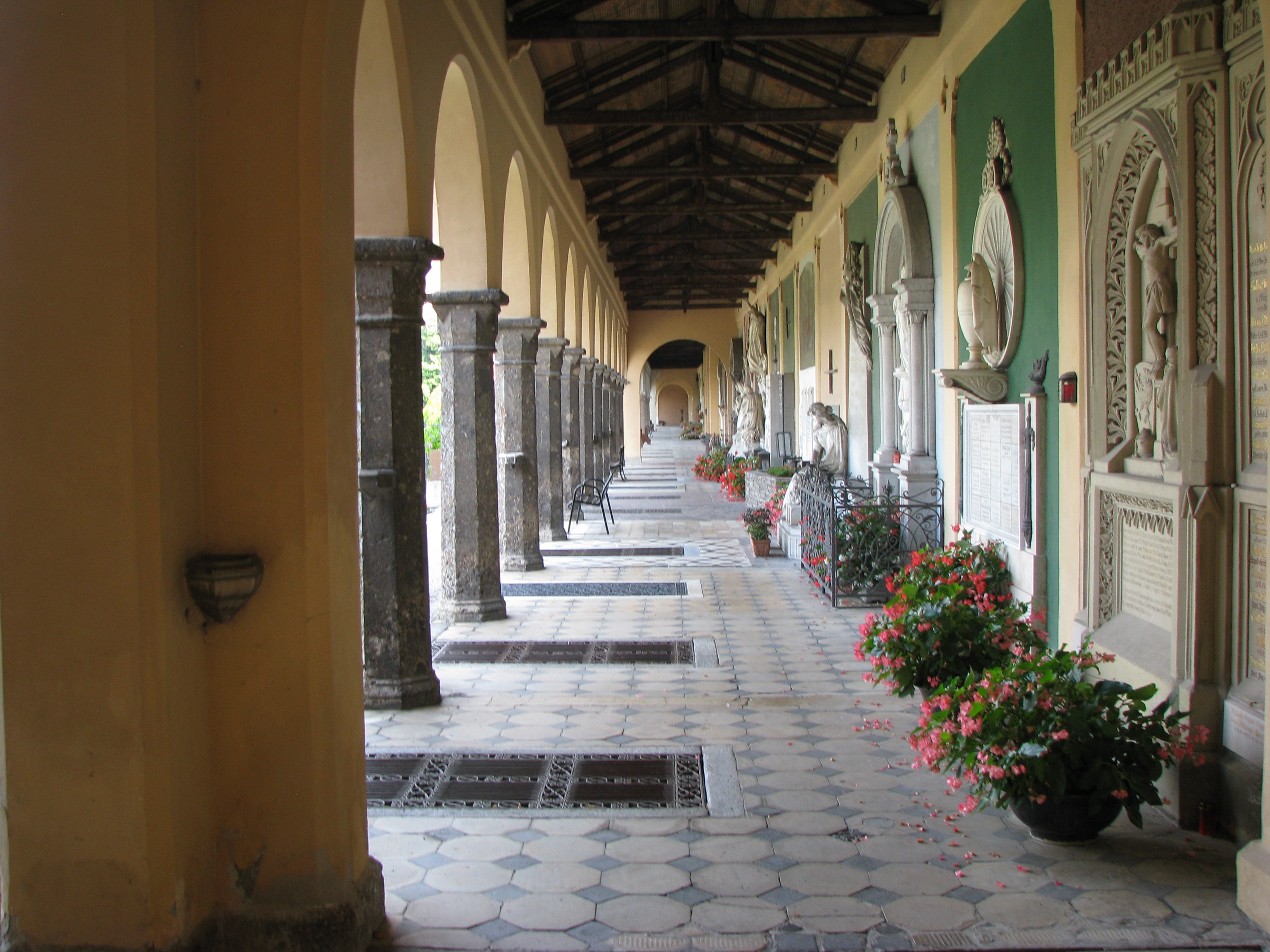 Westfriedhof Innsbruck, Nördlicher Teil, Ostarkaden